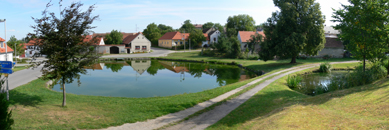 naves obce Hury